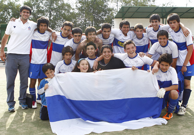 Primer plantel masculino campeón de la rama (Sub 16 2011)